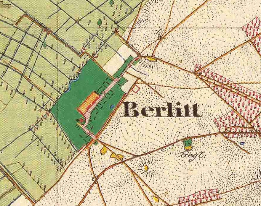 Berlitt, Ortsteil von Kyritz, Lkr. Ostprignitz-Ruppin, Brandenburg, Ausschnitt aus dem Urmesstischblatt 3039 Demerthin von 1843